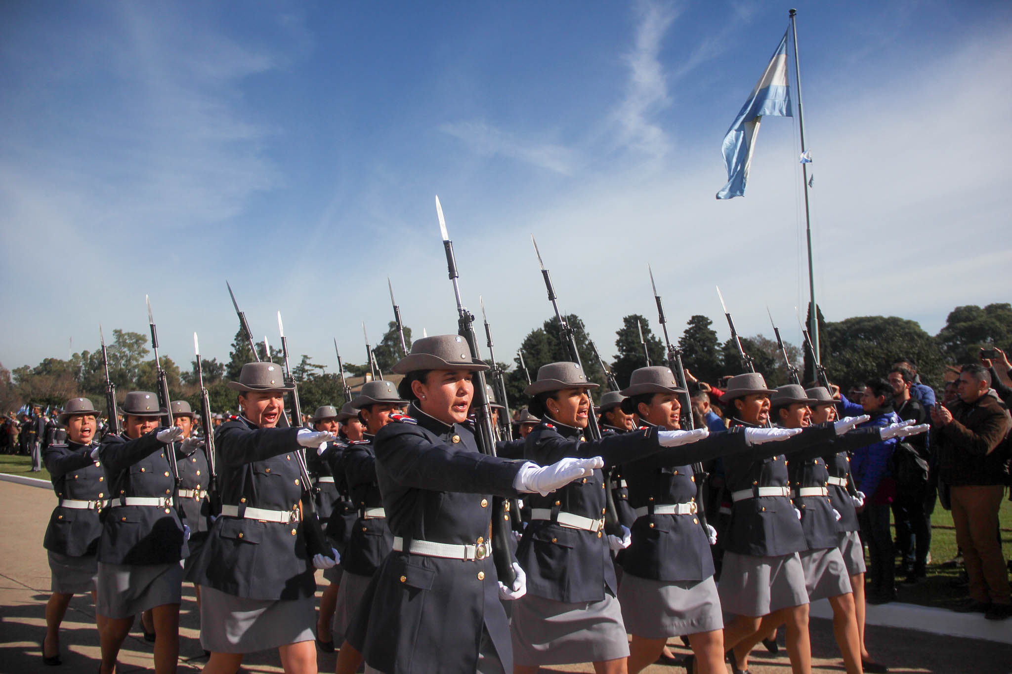 Cadetes de la Escuela de Suboficiales del Ejército «Sargento Cabral» (ESESC).